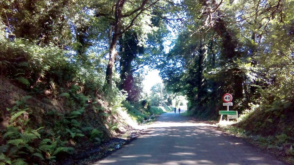 Vista da Carregosa, Curtis.